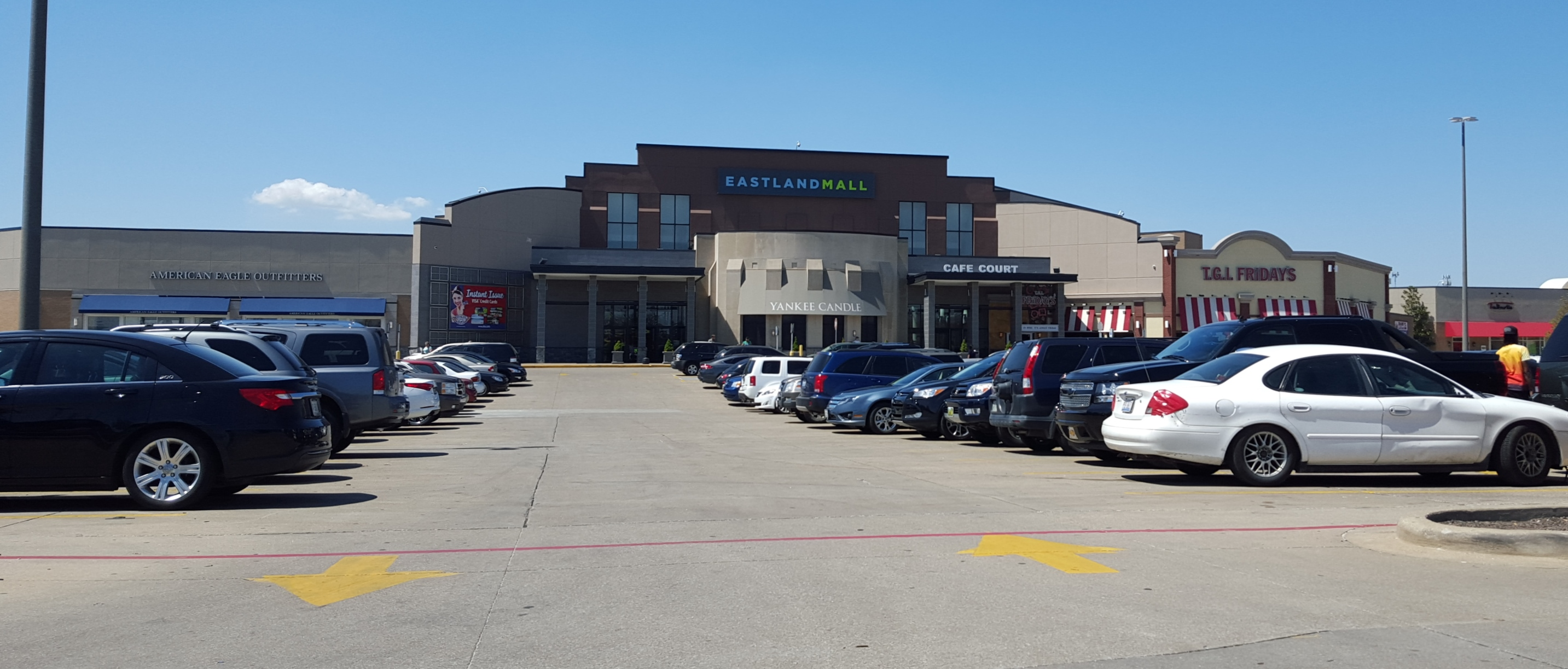 Eastland Mall Evansville, IN